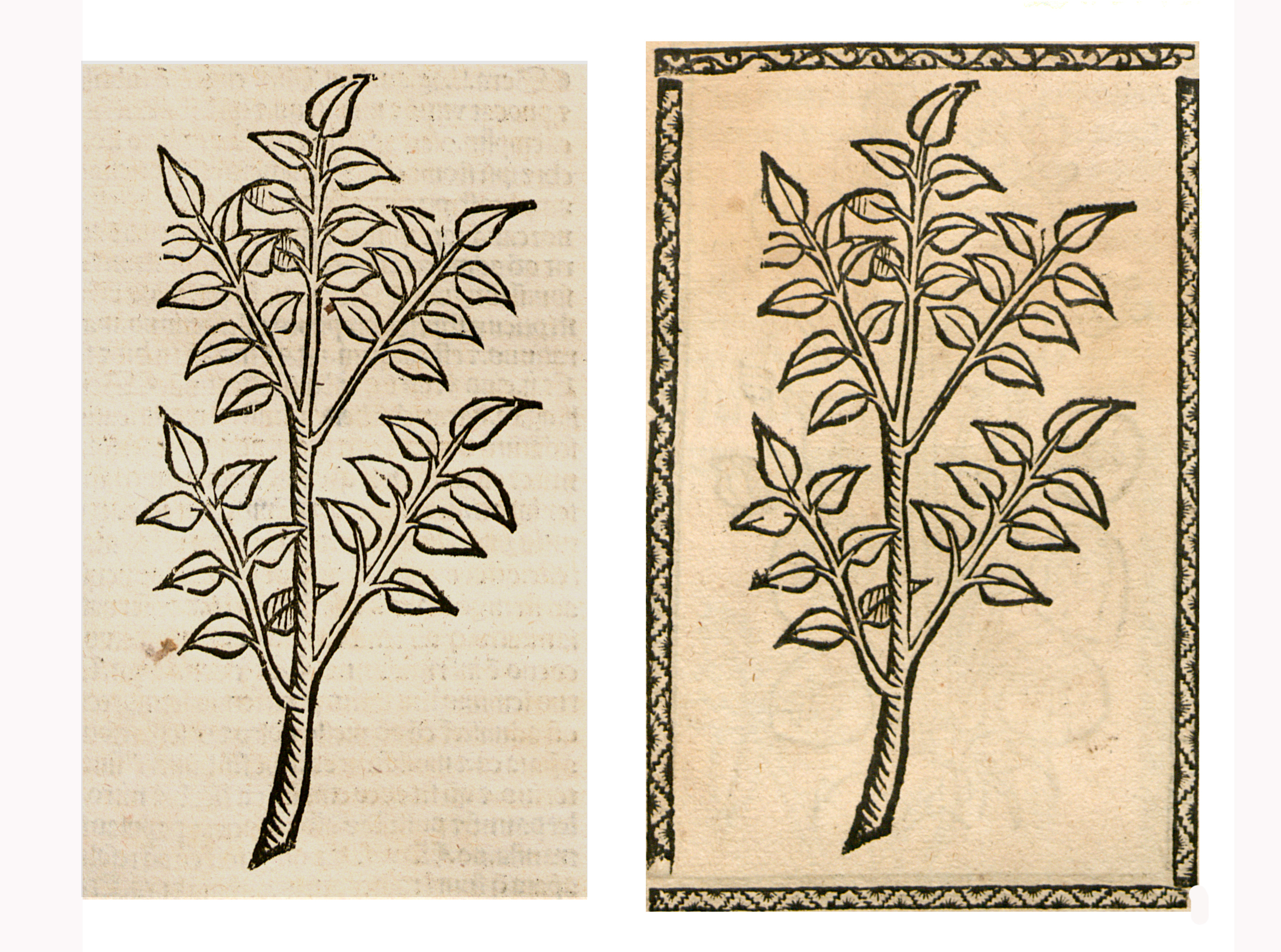 Abbildung zum Kapitel Fogels zung (Fraxinus)